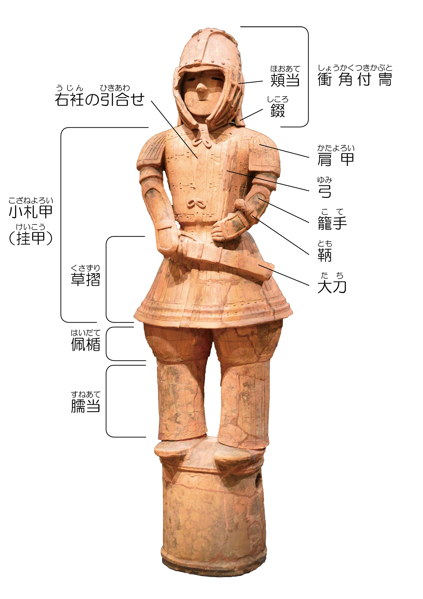 「埴輪 挂甲武人」の甲冑各部名称。